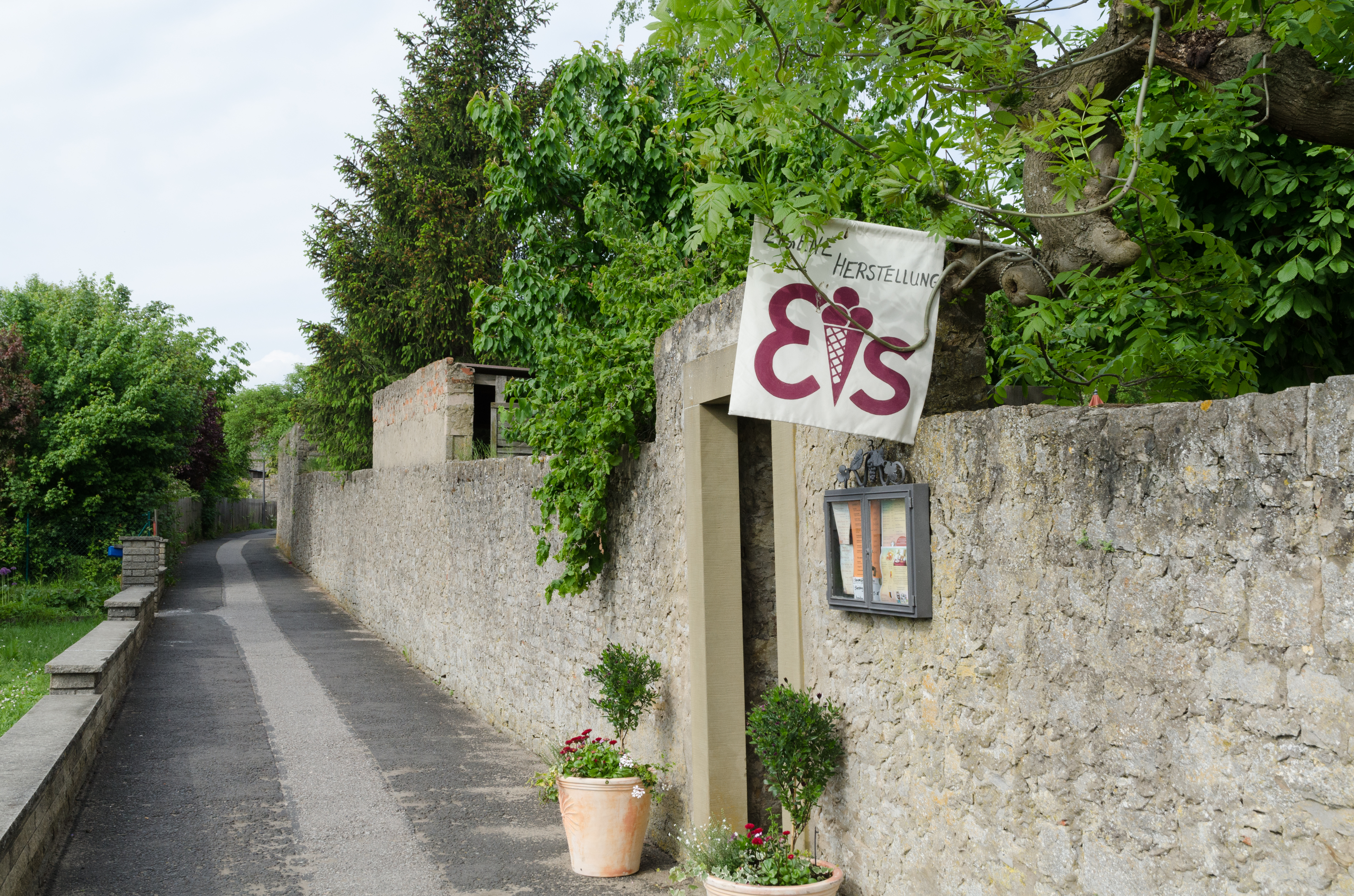 Sommerach, Dorfgraben, Ortsmauer